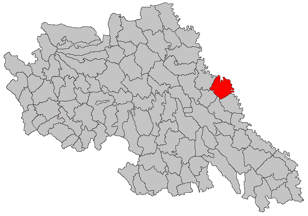 Categorie:Hărţi ale judeţului Iaşi